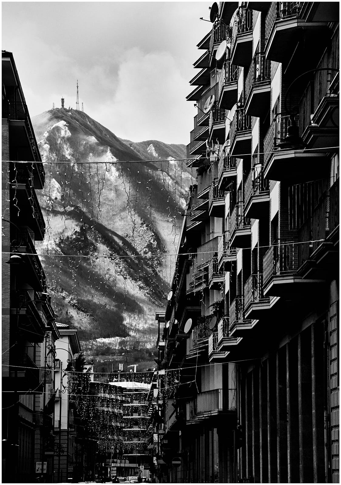 Tribunale, Via Mancini e Montevergine. Avellino